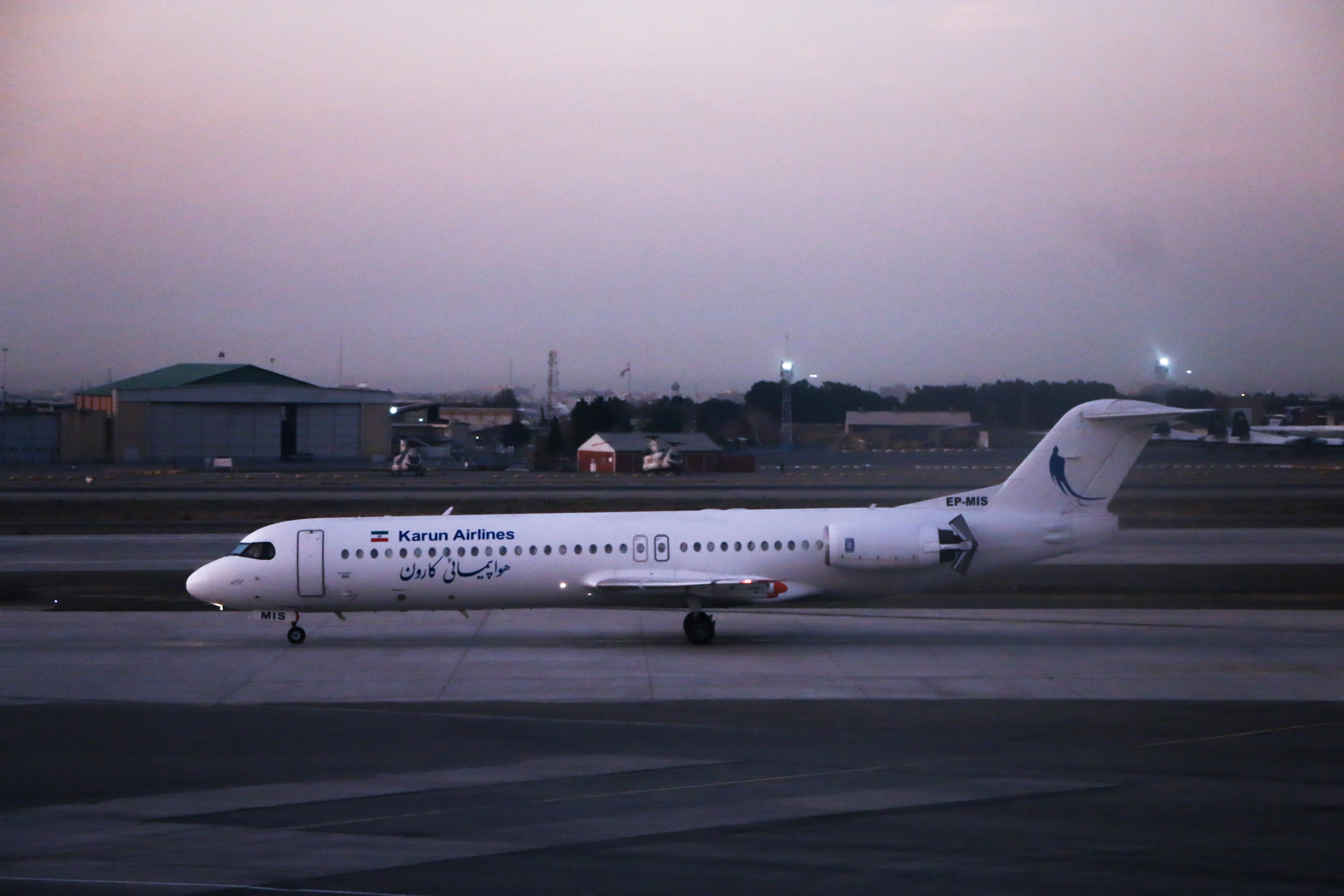 فوکر ۱۰۰ با کد رجیستر EP-MIS